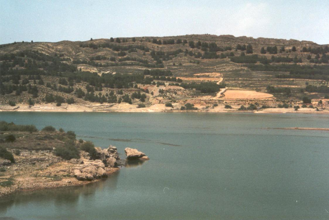 Embalse de La Tranquera en el río Piedra, cerca de Nuévalos, Provincia de Zaragoza. Autor Fev. Fecha junio 2002.